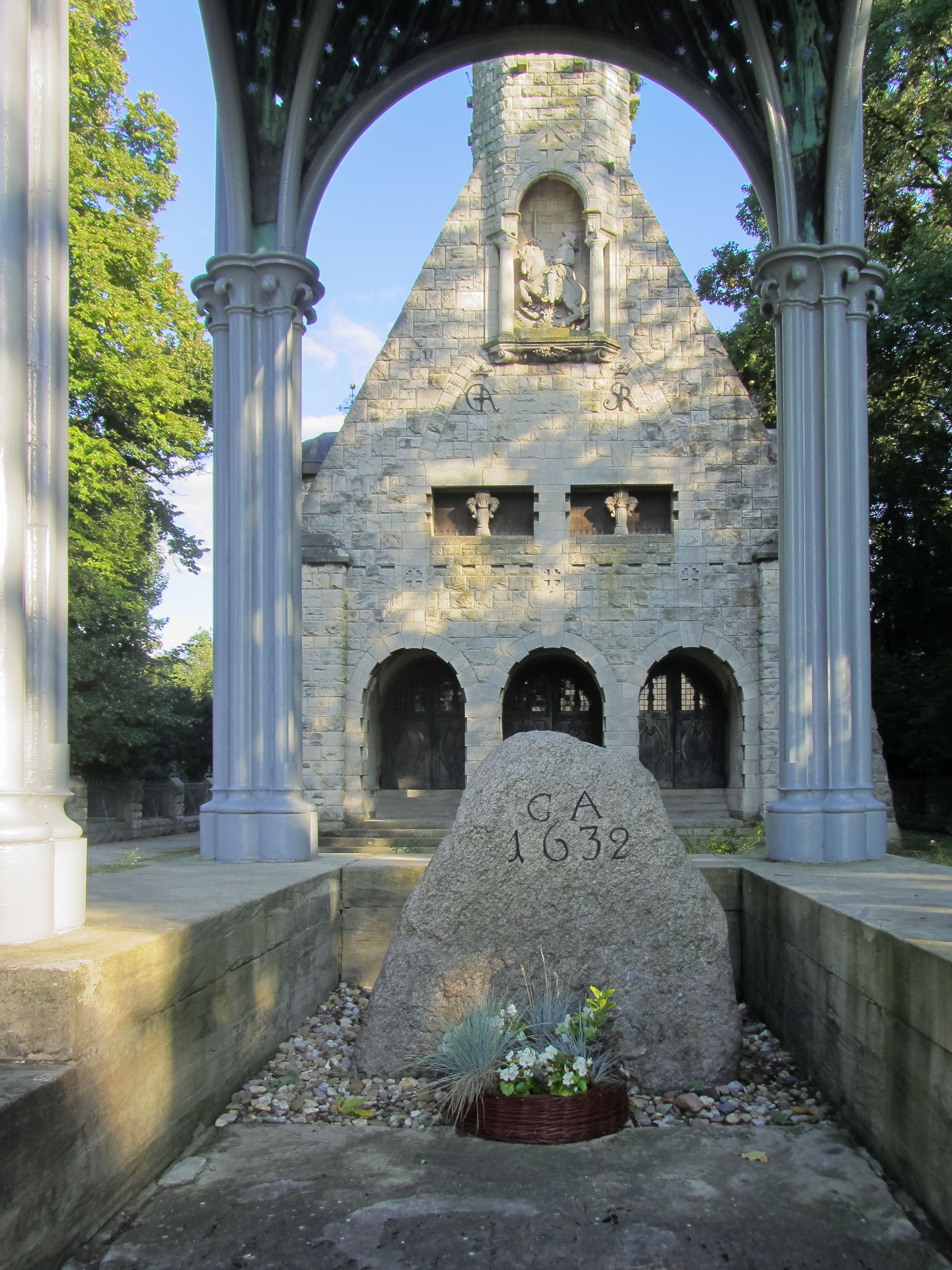 Unter einem gusseisernen Baldachin der Schwedenstein. Am 16.11.1632 fand hier die Schlacht statt, wo gegen 13.00 Uhr der Schwedische König Gustav II. Adolf fiel. Dieser Tatsache ist das Denkmal gewidmet.